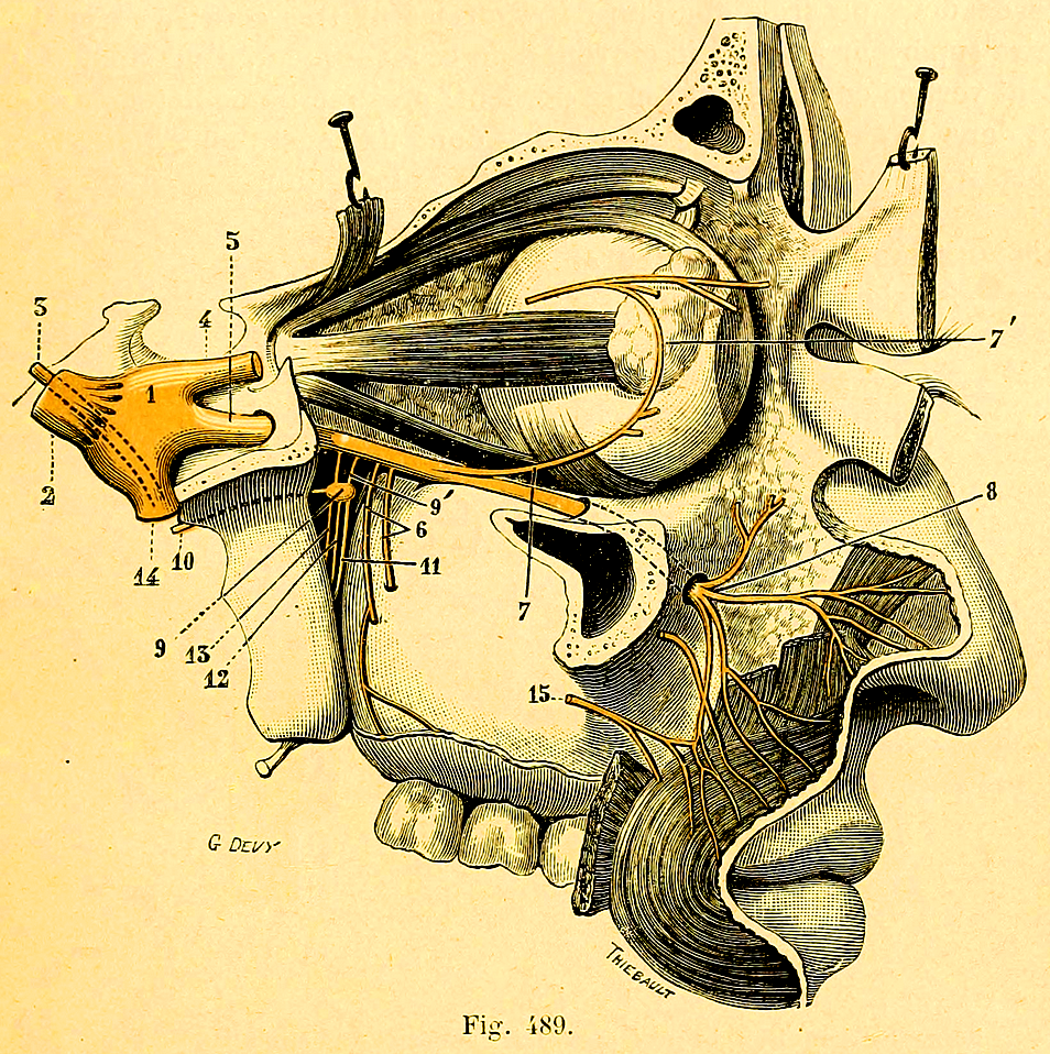 Nerf maxillaire supérieur, vue latérale. I, ganglion de Casser. — 2. grosse racine tlu trijumeau. — 3, sa petite racine. — 4, oplithalniique. — o, nerf maxil- laire supérieur. — 6, nerl's dentaires postérieurs. — 7, rameau orbitaire, s'anastomosant, en 7, avec le lacrymal. — S, bouquet sous-orbitairo. — 0, ganglion sphéno-palatin, avec 9', ses racines sensitives. — 10, nerf vidien. — 11, 1:2, 13, nerl's palatins antérieur, moyen et postérieur. — 14, nerf maxillaire inférieur. — l.ï, un rameau du facial, s'anasto- mosant avec des filets sous-orbitaires.